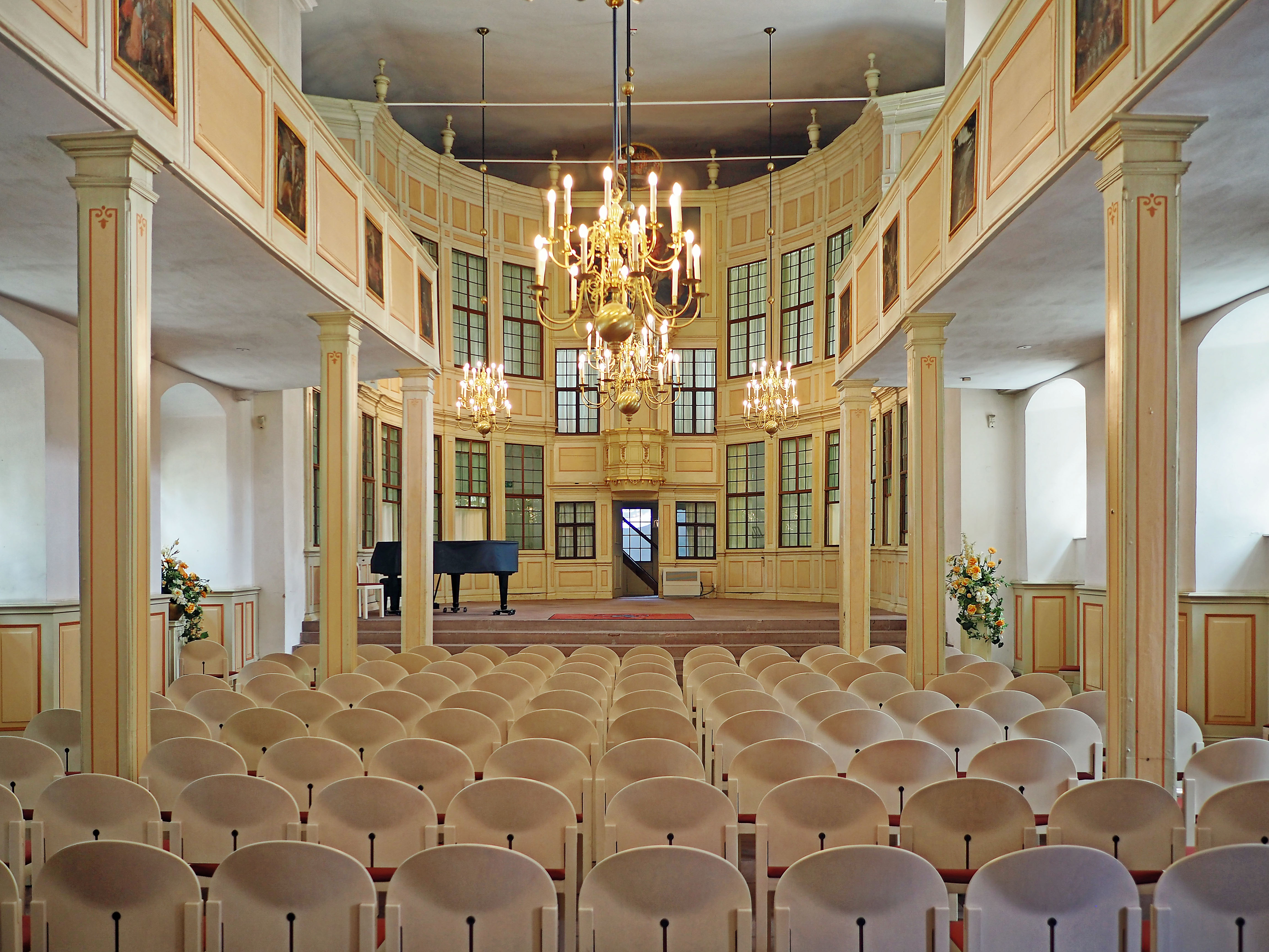 Schloss Bad Homburg - Schlosskirche